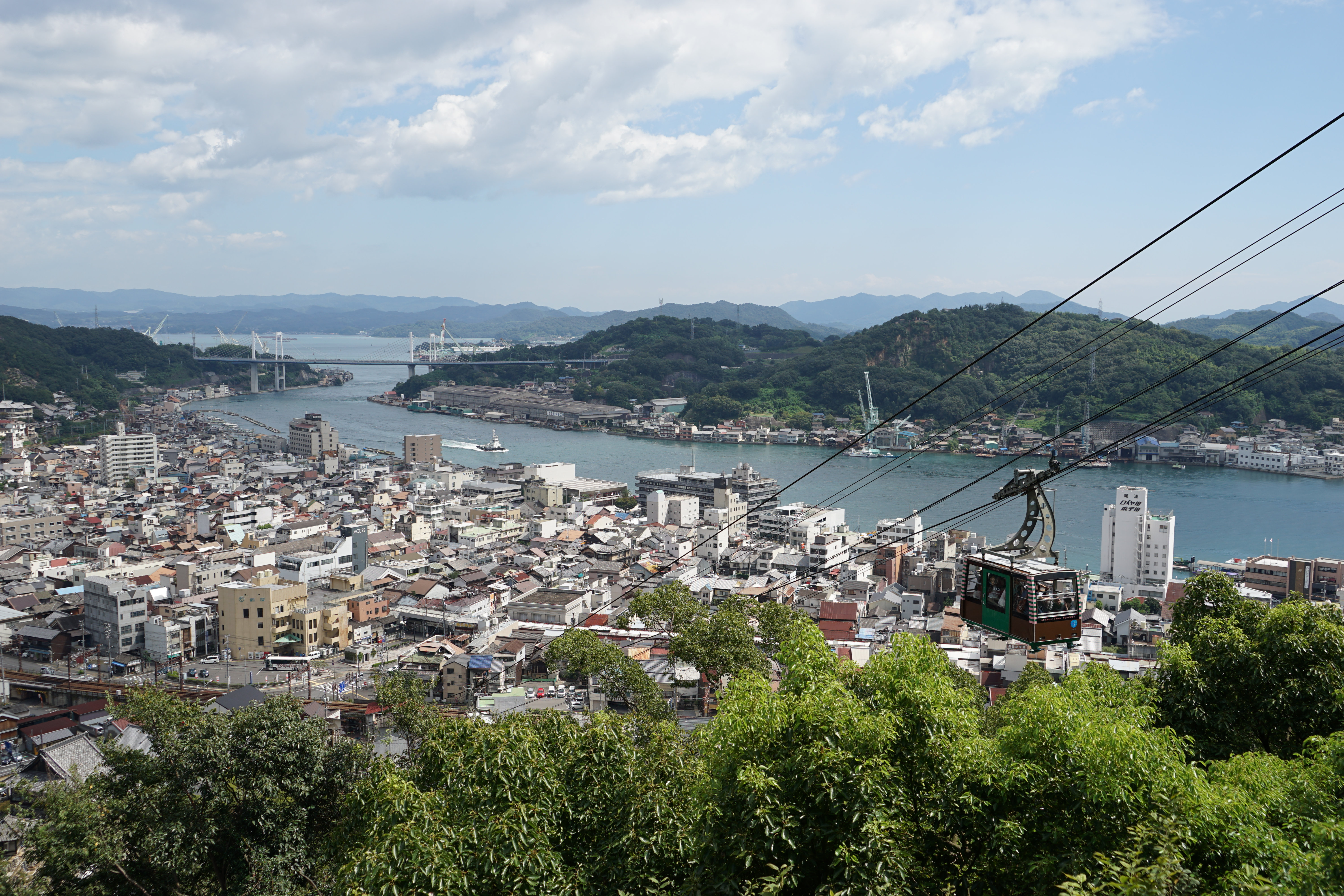 尾道千光寺より尾道市街東側と尾道水道を撮影